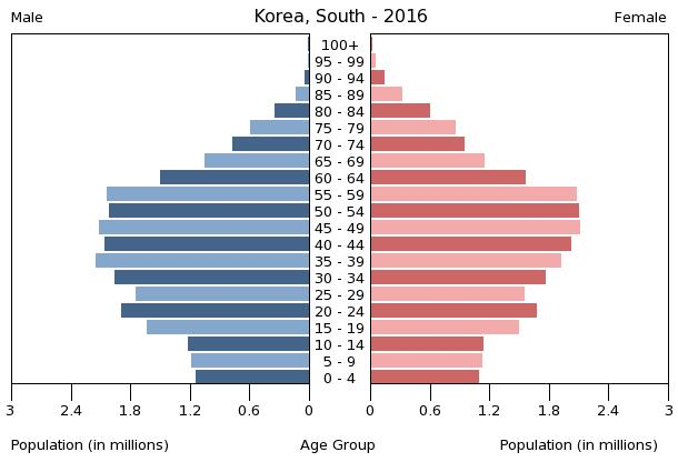 Demografie Südkoreas